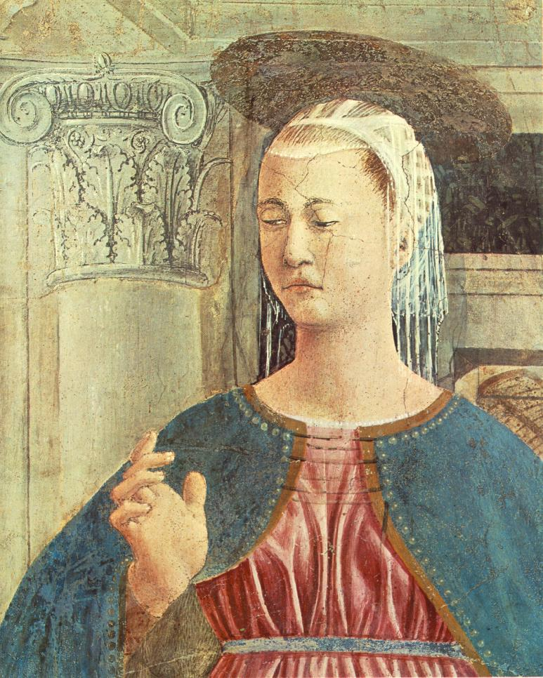 PIERO della FRANCESCA Annunciation Fresco, 329 x 193 cm San Francesco, Arezzo